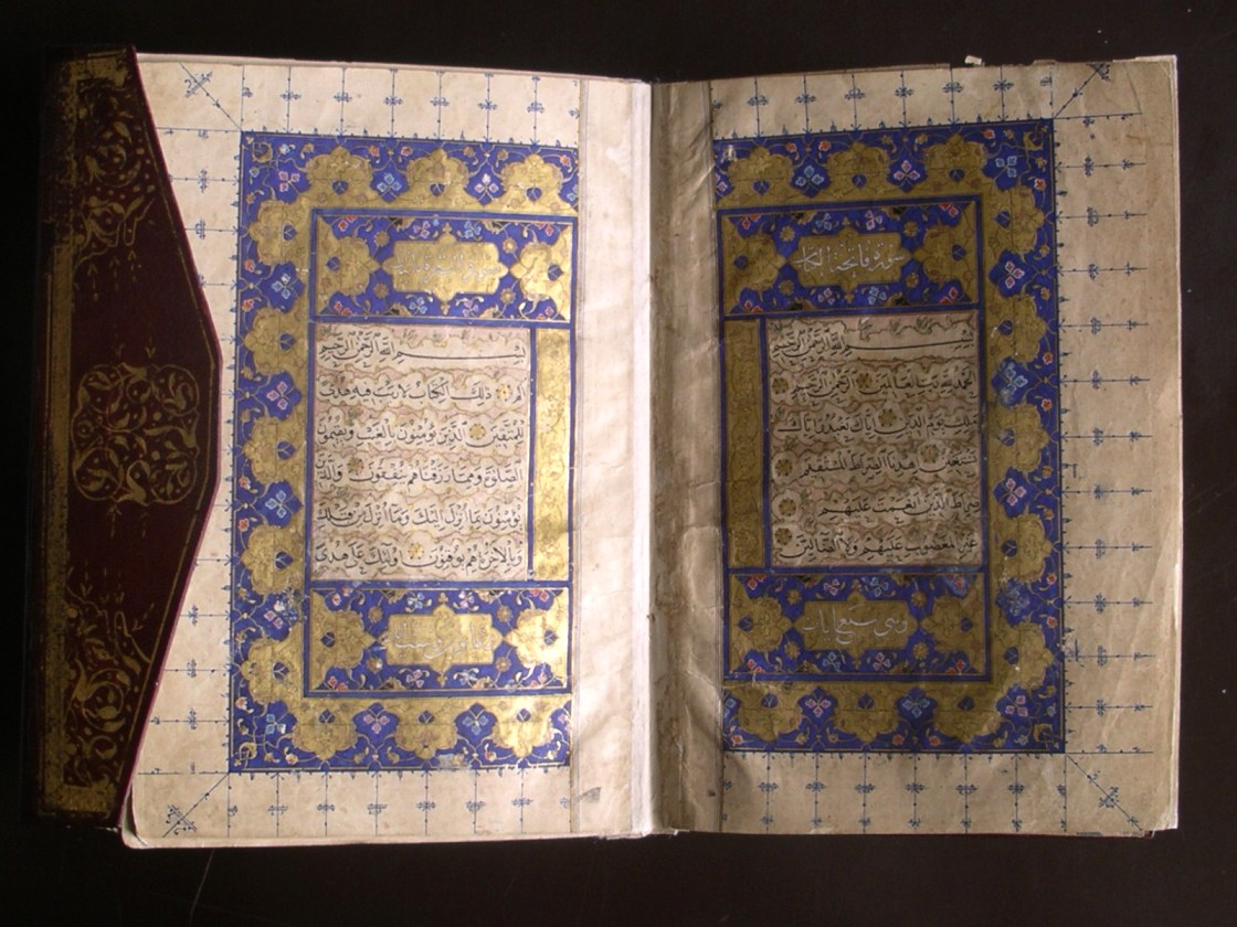 Coran d'Ibn-al-Yas, Iran, an 1506, Musée d'art sacré du Gard, Pont-Saint-Esprit, France